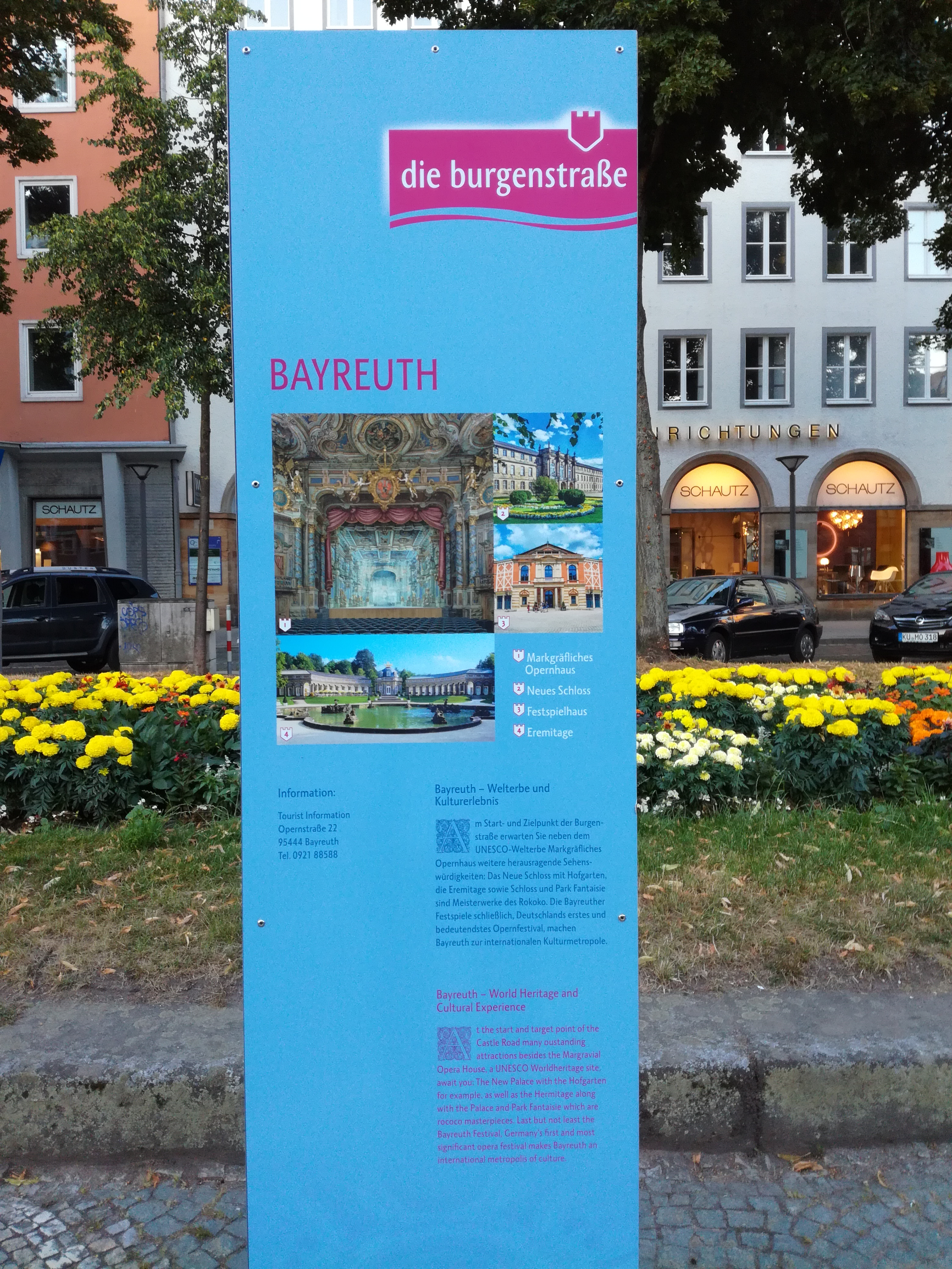 Stele Burgenstraße Bayreuth Luitpoldplatz